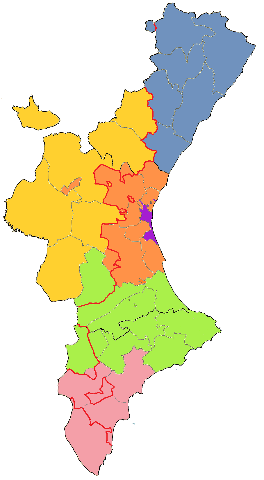 Regiones de la Comunidad Valenciana y límite de la zona valencianohablante.